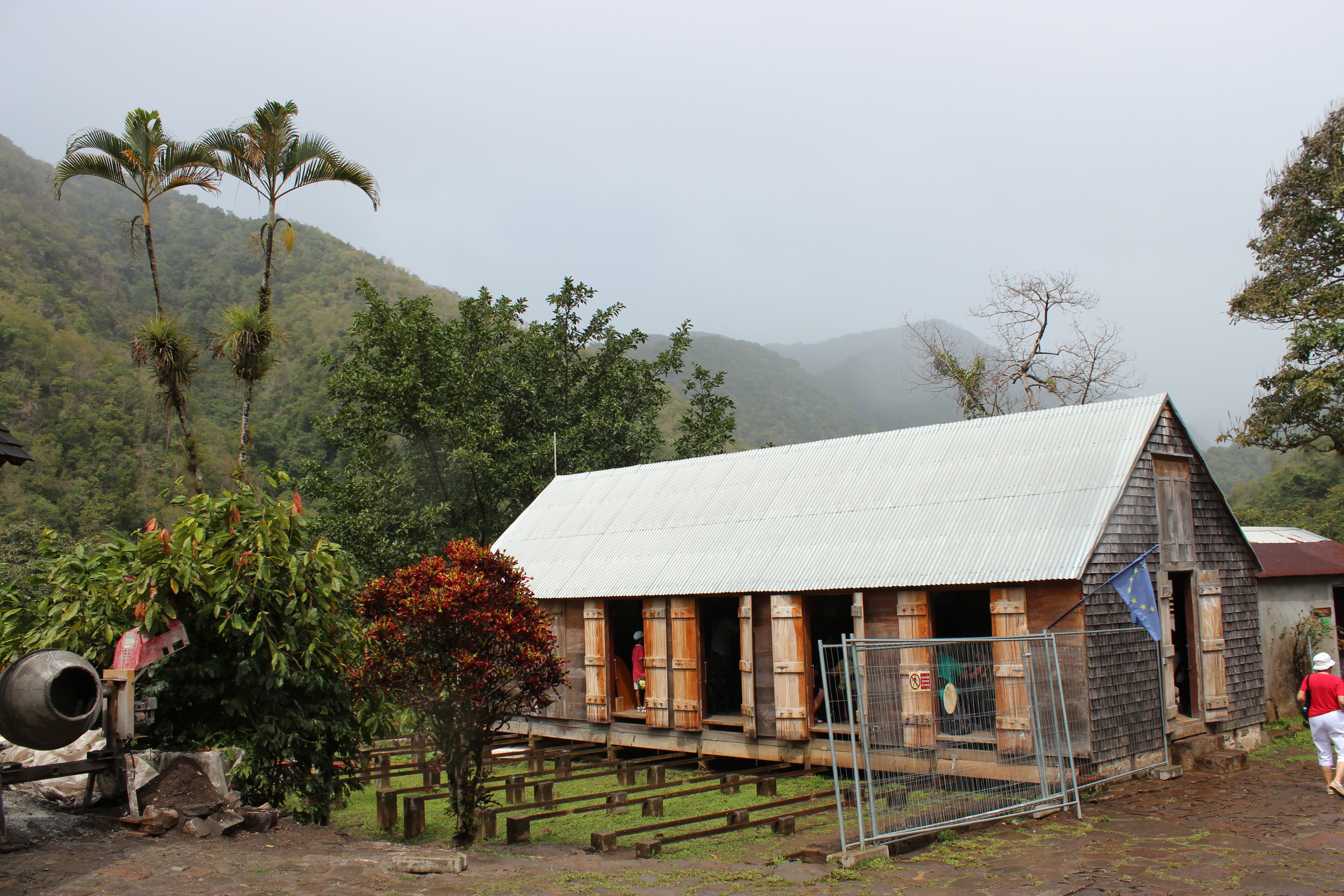 Habitation La Grivelière, Grande Rivière, Vieux-Habitants, Guadeloupe